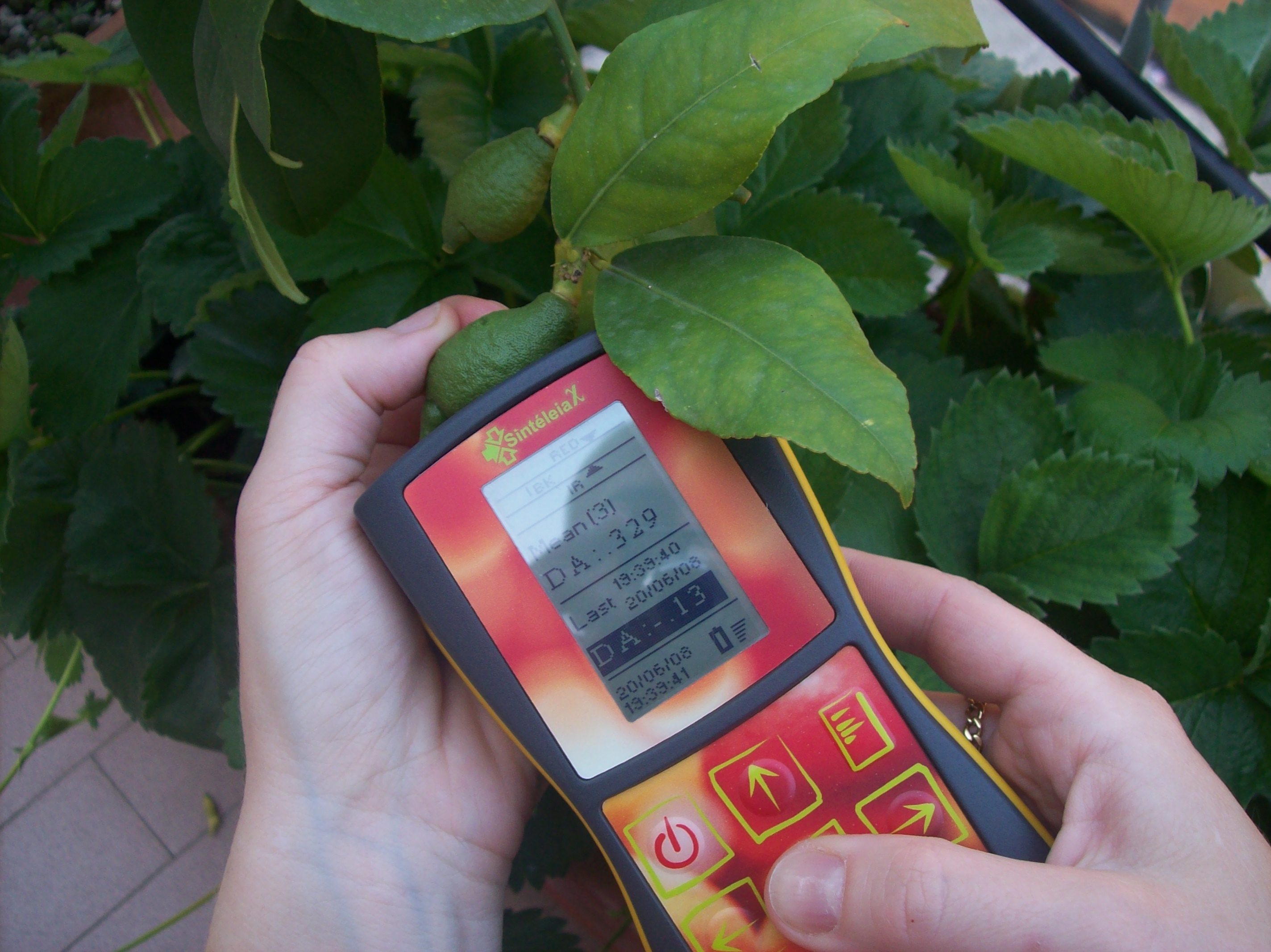 Fotografia dell'uso di un DA_Meter prodotto da SinteleiaX srl.